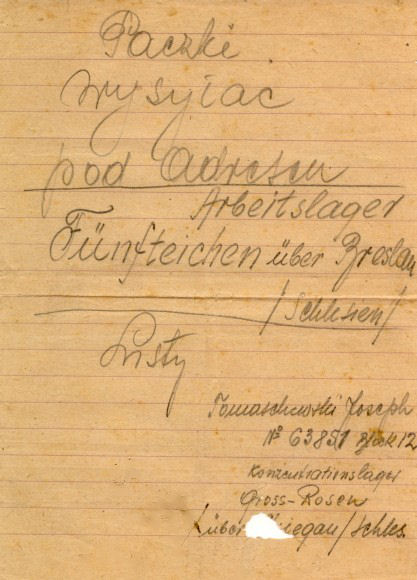 Fragment listu z adresem filii obozu koncentracyjnego Gross Rosen w Fünfteichen (ob. Miłoszyce w gminie Jelcz-Laskowice) z 1944 r.; Nadawca - Józef Tomaszewski, ur. 1923, mieszkaniec Łodzi